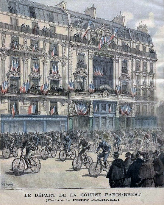 Paris-Brest-Paris 1891, départ - supplément illustré du Petit Journal, 12 septembre 1891 (numéro 42), p.8